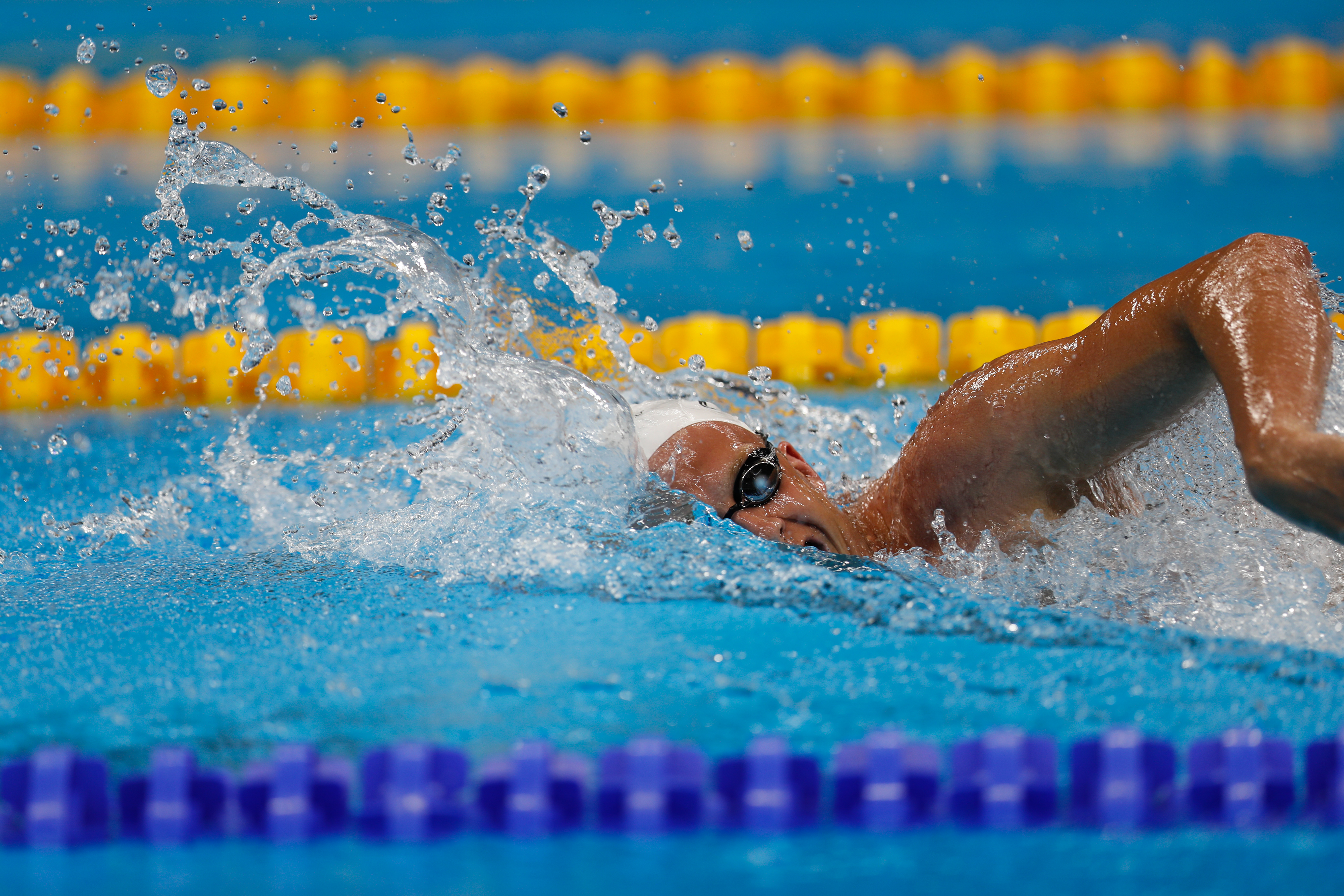 Rio de Janeiro - Atletas da equipe de natação das Ilhas Cayman treinam na piscina do Estádio Aquático, no Parque Olímpico da Barra da Tijuca (Fernando Frazão/Agência Brasil)